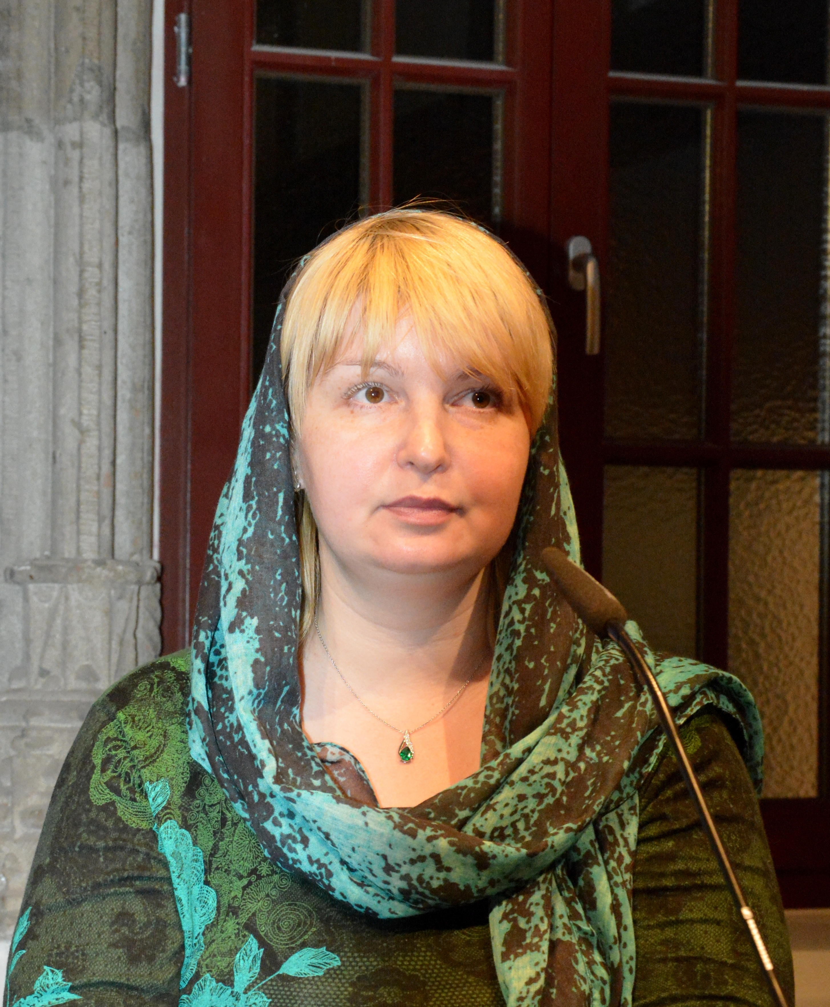 В Кельне литературный фестиваль Lit.Cologne, 2015